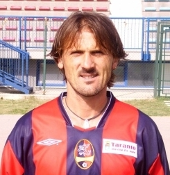 deflorio, opera propria foto scattata da me Licensing Deflorio, Andrea